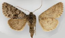 Lasionycta subfuscula subfuscula female